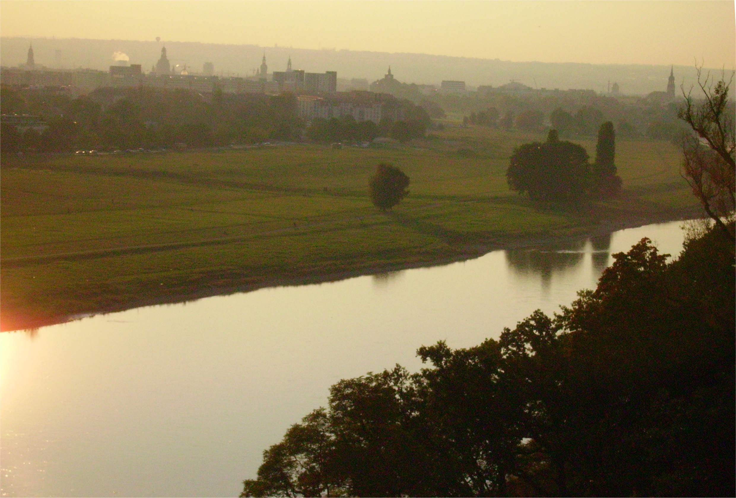 Blick von Terrasse der Villa Stockhausen